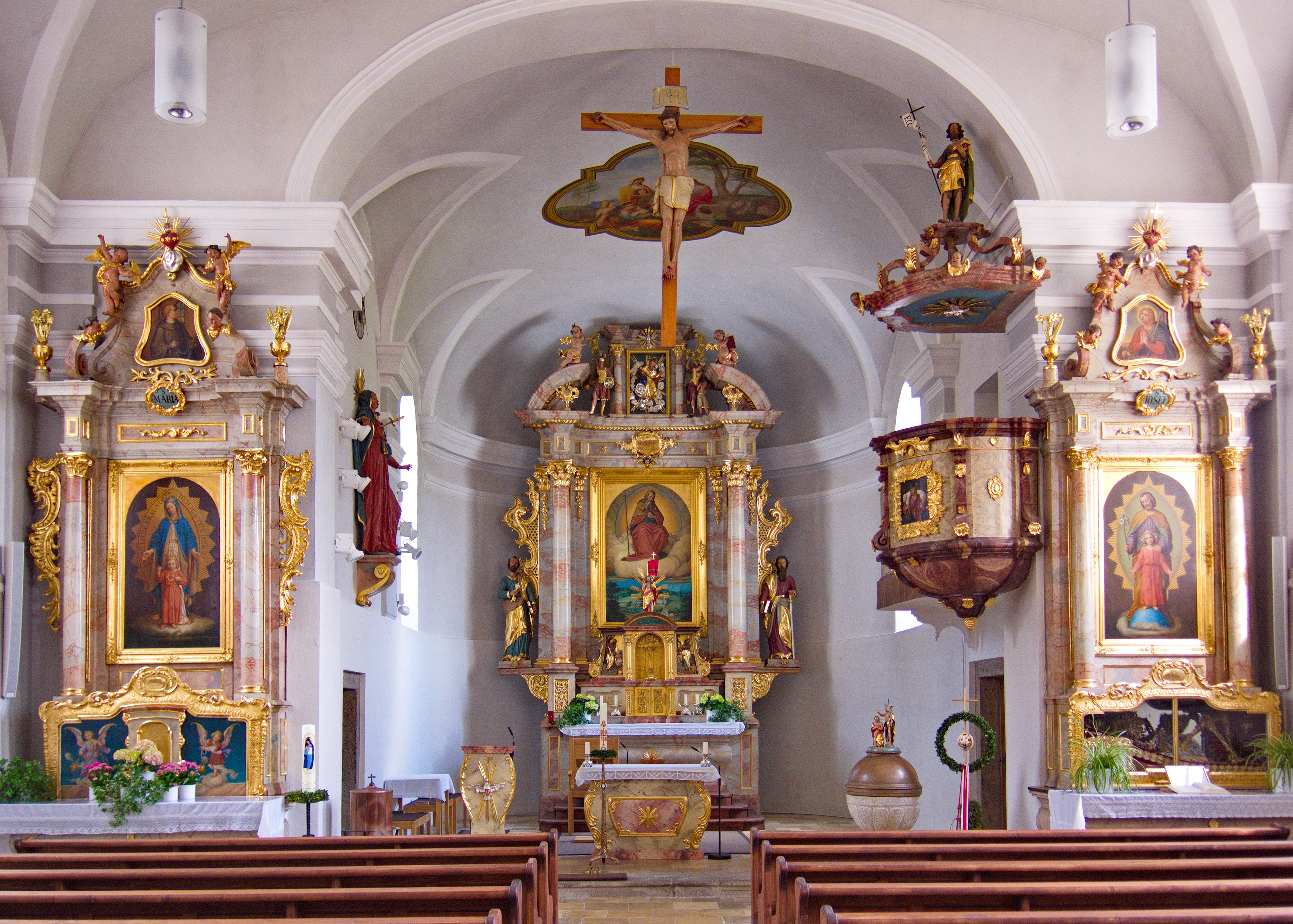 Hochaltar und die beiden Seitenaltäre der Pfarrkirche St. Jakobus in Achslach